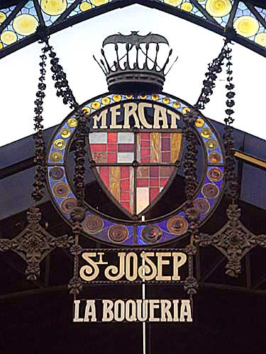 Bild:ForbysBoqueria.jpg Beschreibung: Mercat de la Boqueria - Eingang zu den Markhallen an den Les Rambles in Barcelona. Quelle: fotogarfiert am 16. Oktober 2002 Fotograf: Benutzer:Forbfruit Lizenz: GNU-FDL